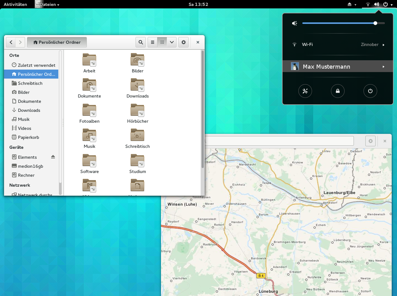 GNOME 3.10 Desktop mit Dateimanager Nautilus, Kartenansicht Maps und offenem Sitzungsmenü.